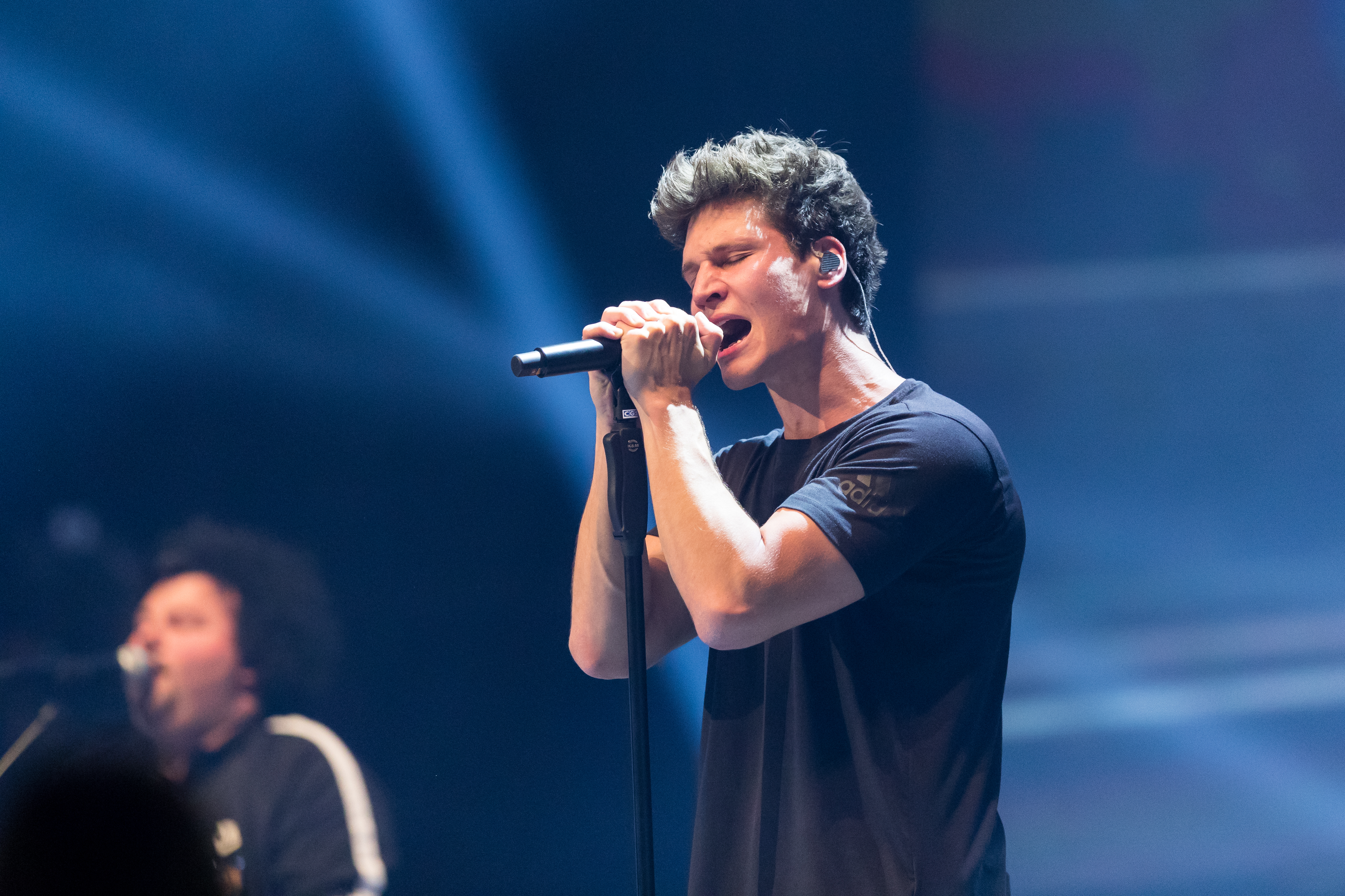 Wincent Weiss during 30 Jahre Radio Regenbogen at SAP Arena, Mannheim, Mannheim, Germany on 2018-04-21, Photo: Sven Mandel